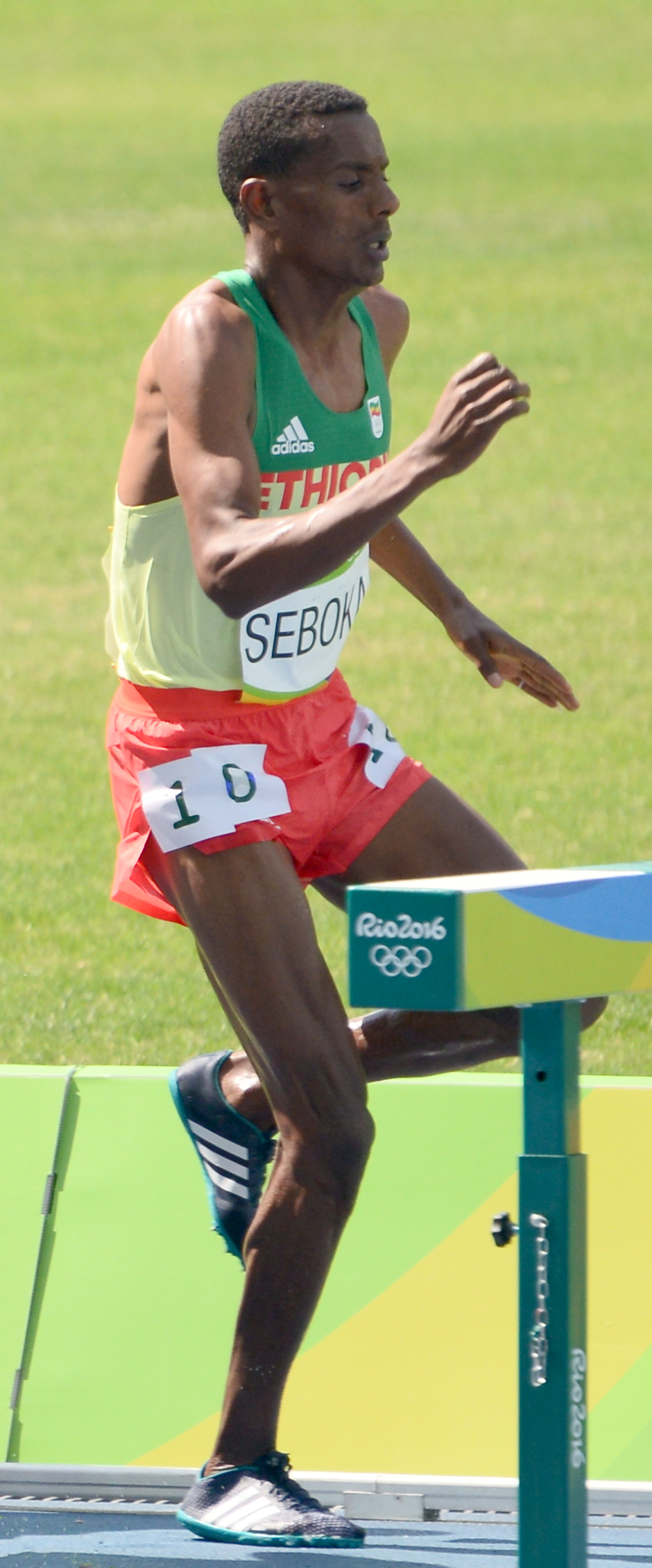 Série du 3000m steeple Homme des JO de Rio, 2016